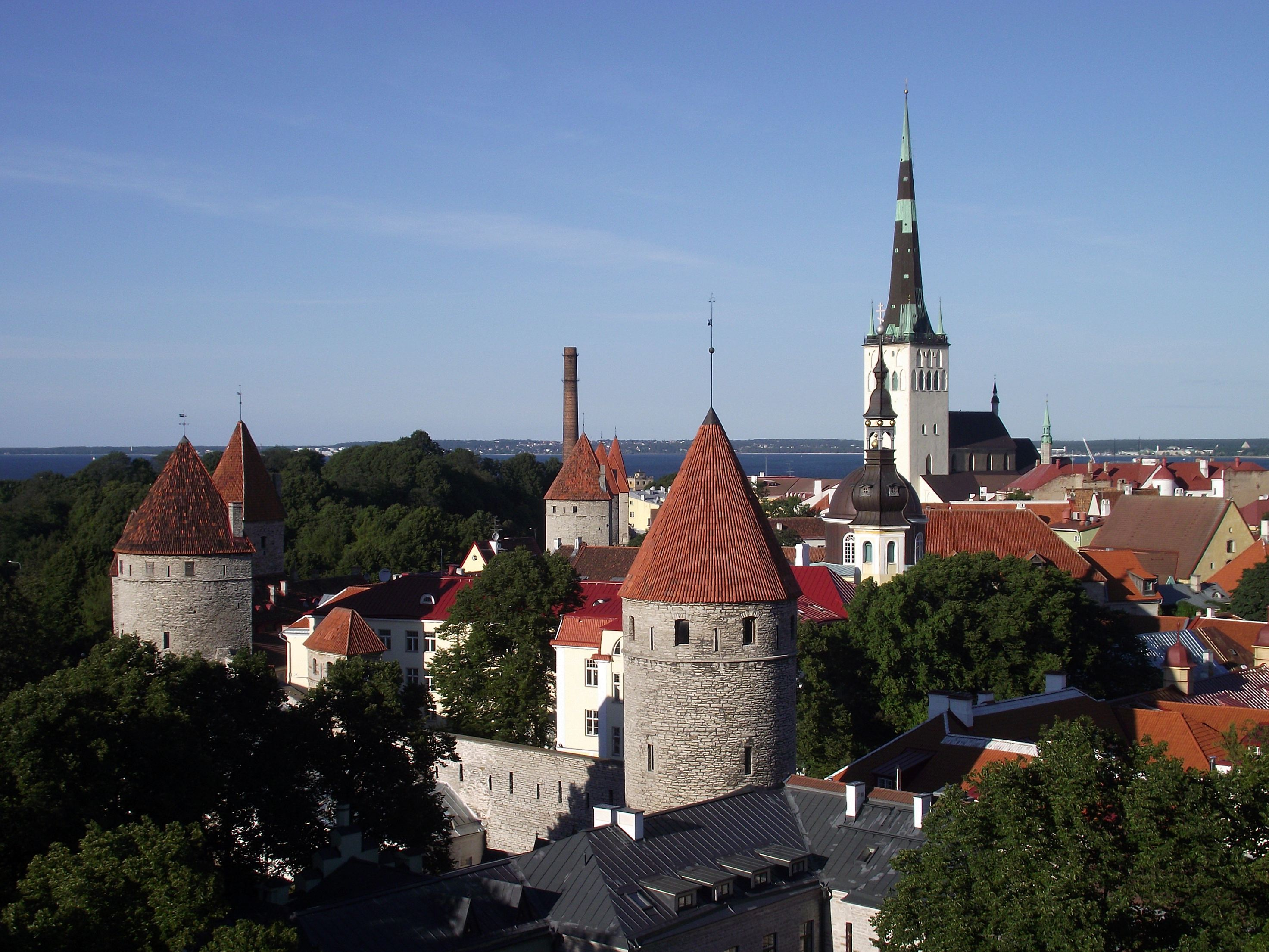 Vaade Tallinna vanalinnale Patkuli vaateplatvormilt.